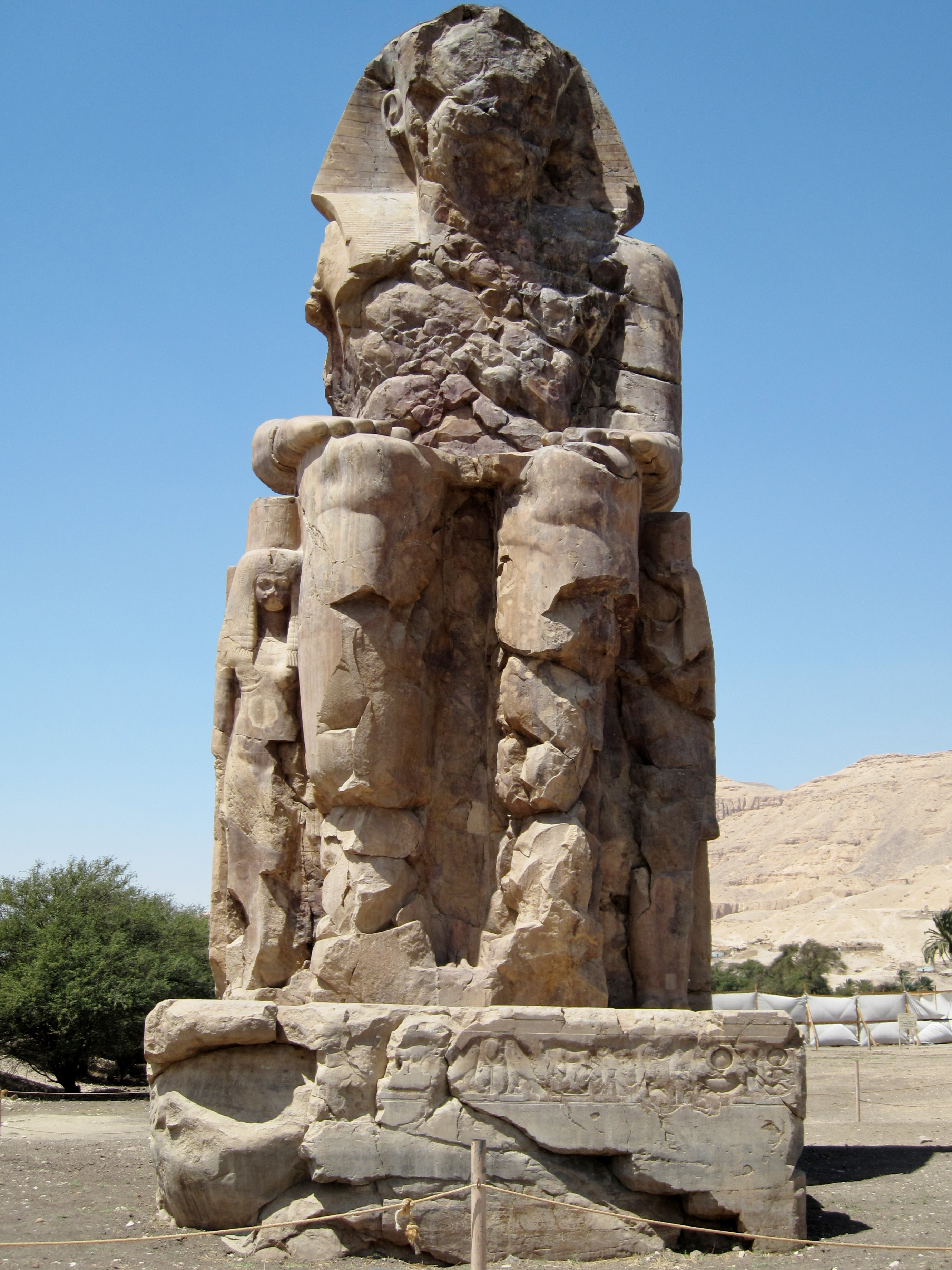 Der südliche der Memnonkolosse in Theben-West (bei Luxor), Ägypten